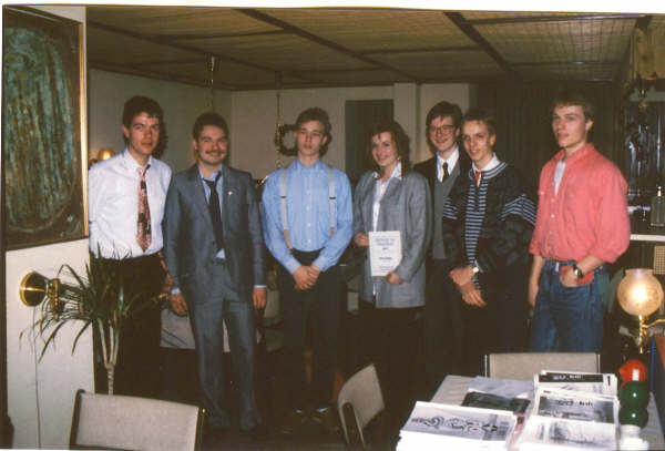 Lørdag d. 20. februar 1988 afholdt Folkeskoleelevernes Landsorganisation reception i restaurant Richelieu på Halmtorvet i København. Ved formiddagens reception var der afsløring af organisationens første jubilæumsskrift "10 år med aktive elever" og 7 af foreningens formænd og næstformænd var forsamlede ved den anledning. Fra venstre mod højre: Søren Pold (fmd. 1981-83), Bo Libergren (fmd. 1984-86), Andreas Berggreen (fmd. 1987-88), Pernille Strønæs (foreningsstifter, næstformand 1978), Jens Kloppenborg-Skrumsager (fmd. 1987-88), Niklas Dalsjø (næstfmd. 1987-88) & Flemming Anhøi Holm (fmd. 1980-81, næstfmd. 1981-82).